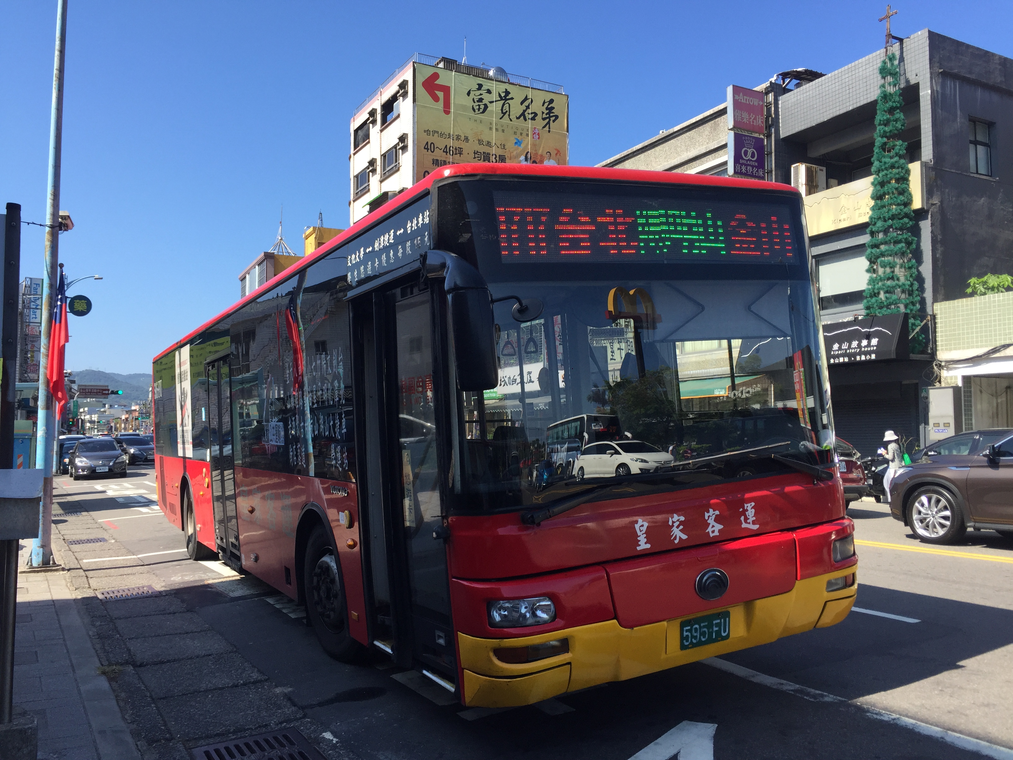 新北市金山區中山路，皇家客運總站前，皇家客運台灣宇通ZK6128HG大客車595-FU。